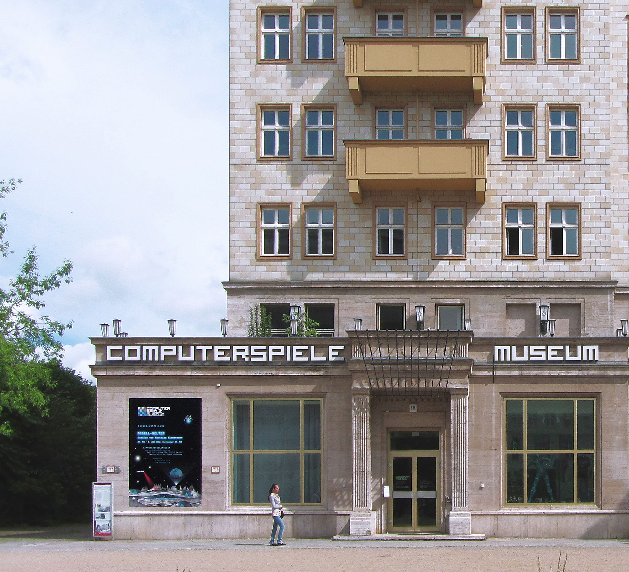 Aussenansicht vom Computerspielemuseum Berlin, während der monographischen Sonderausstellung "Modell-Welten - Gemälde von Matthias Zimmermann", 22. Mai - 8. Juli 2013